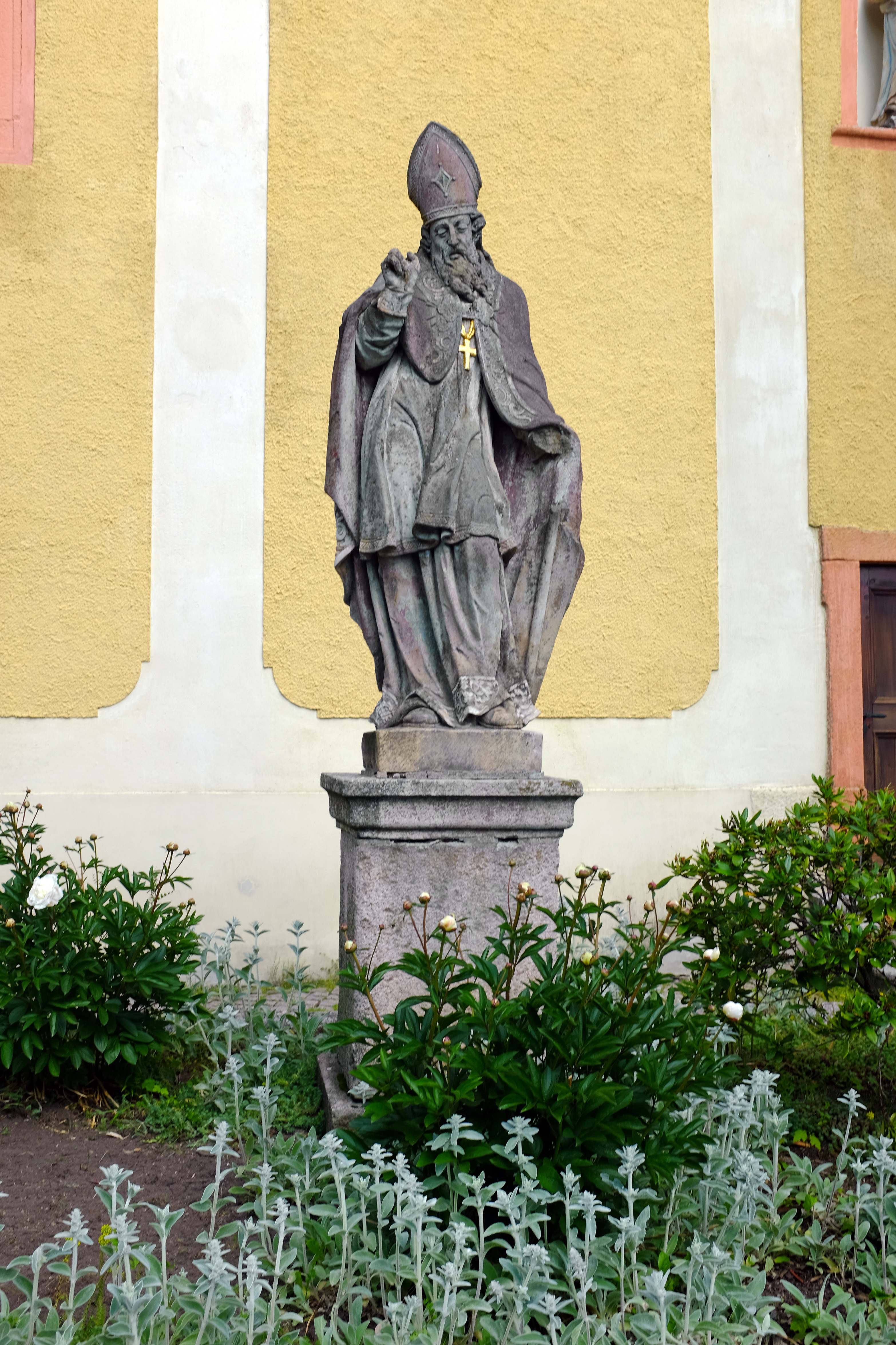 Socha svatého Vojtěcha, Horní Blatná.